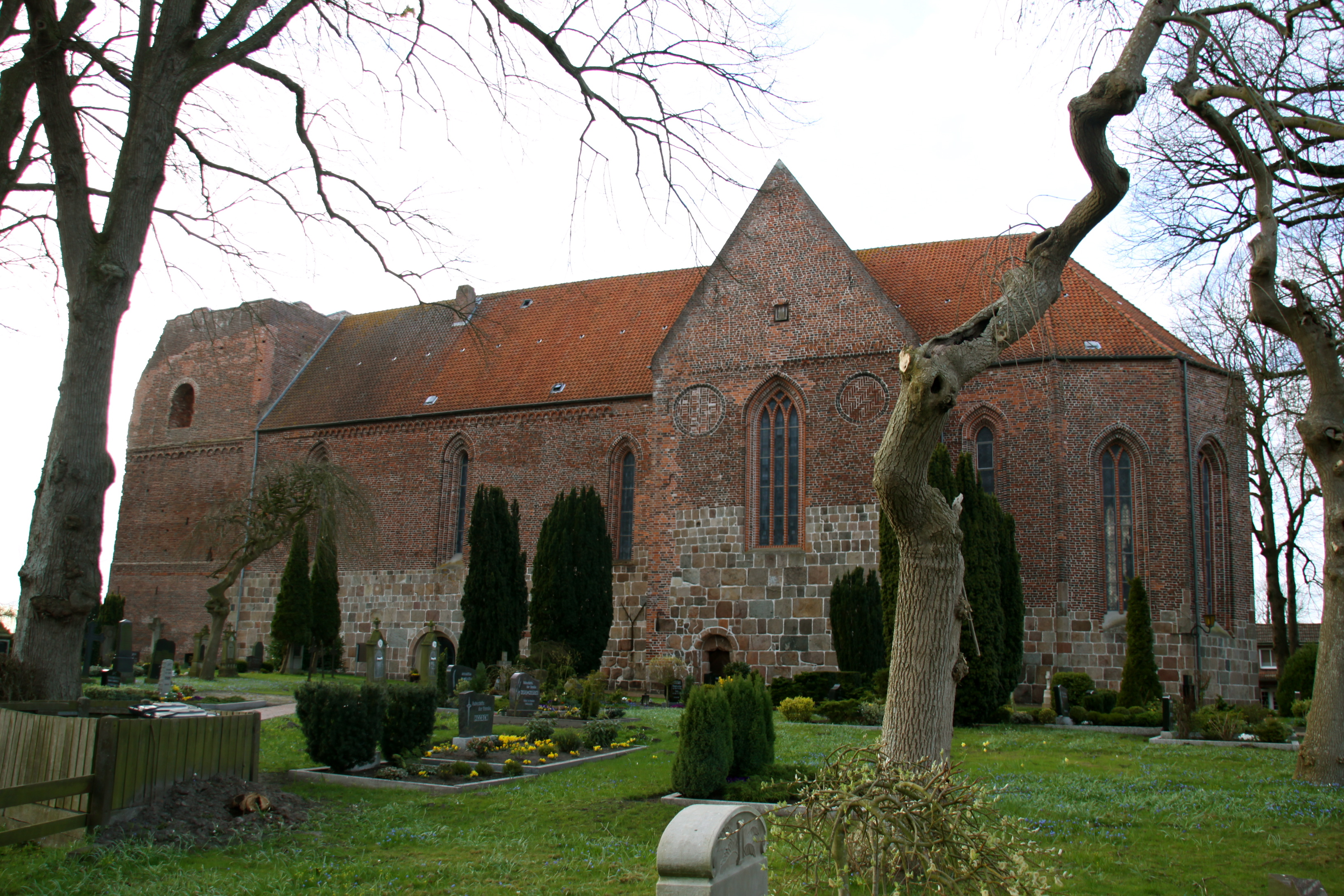 Kirche von Reepsholt (Niedersaxen). An den Giebeln des Querschiffes, ein Rundblenden mit Fischgrätenverband.13. Jahrhundert